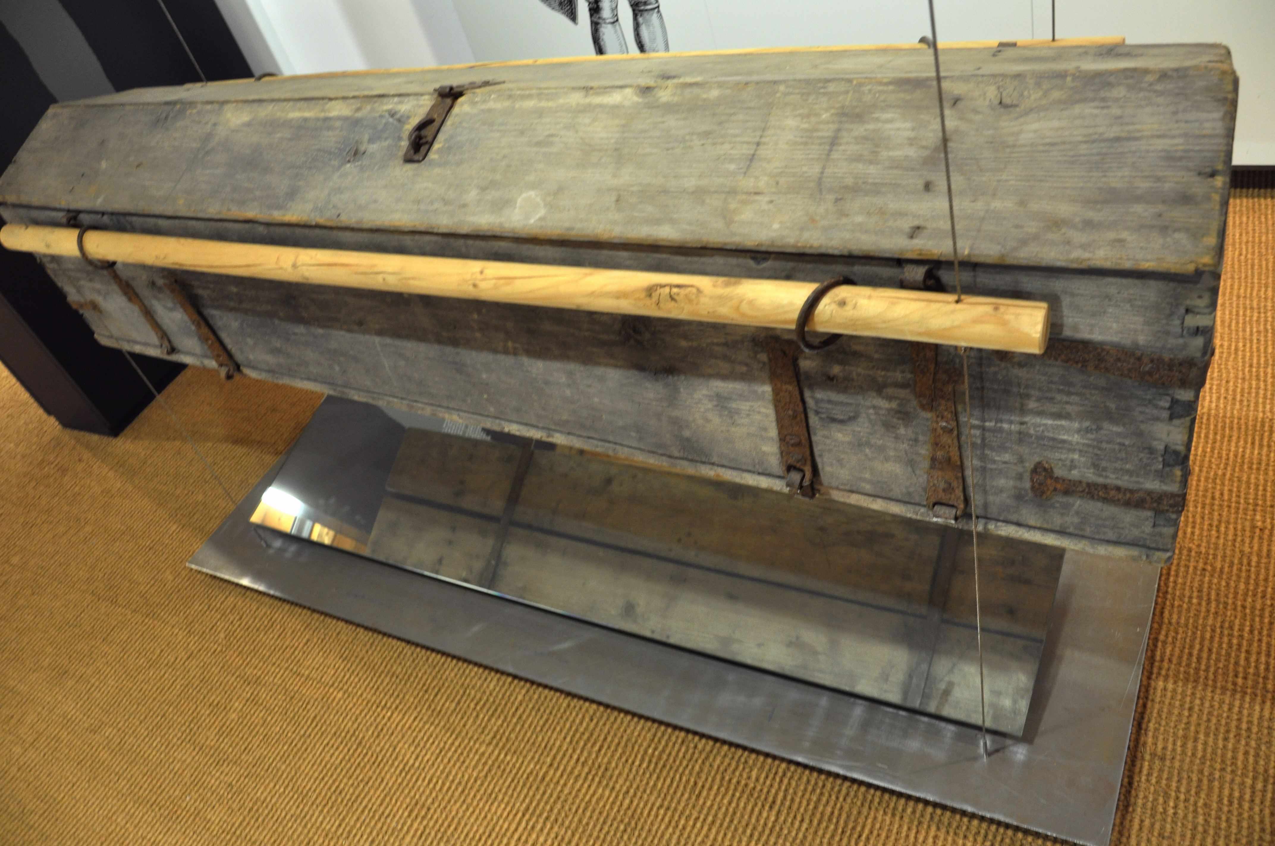 Jospehinischer Gemeindesarg (Klappsarg) aus Renhardsweiler, 2. Hälfte 18. Jahrhundert, Stadtmuseum Bad Saulgau